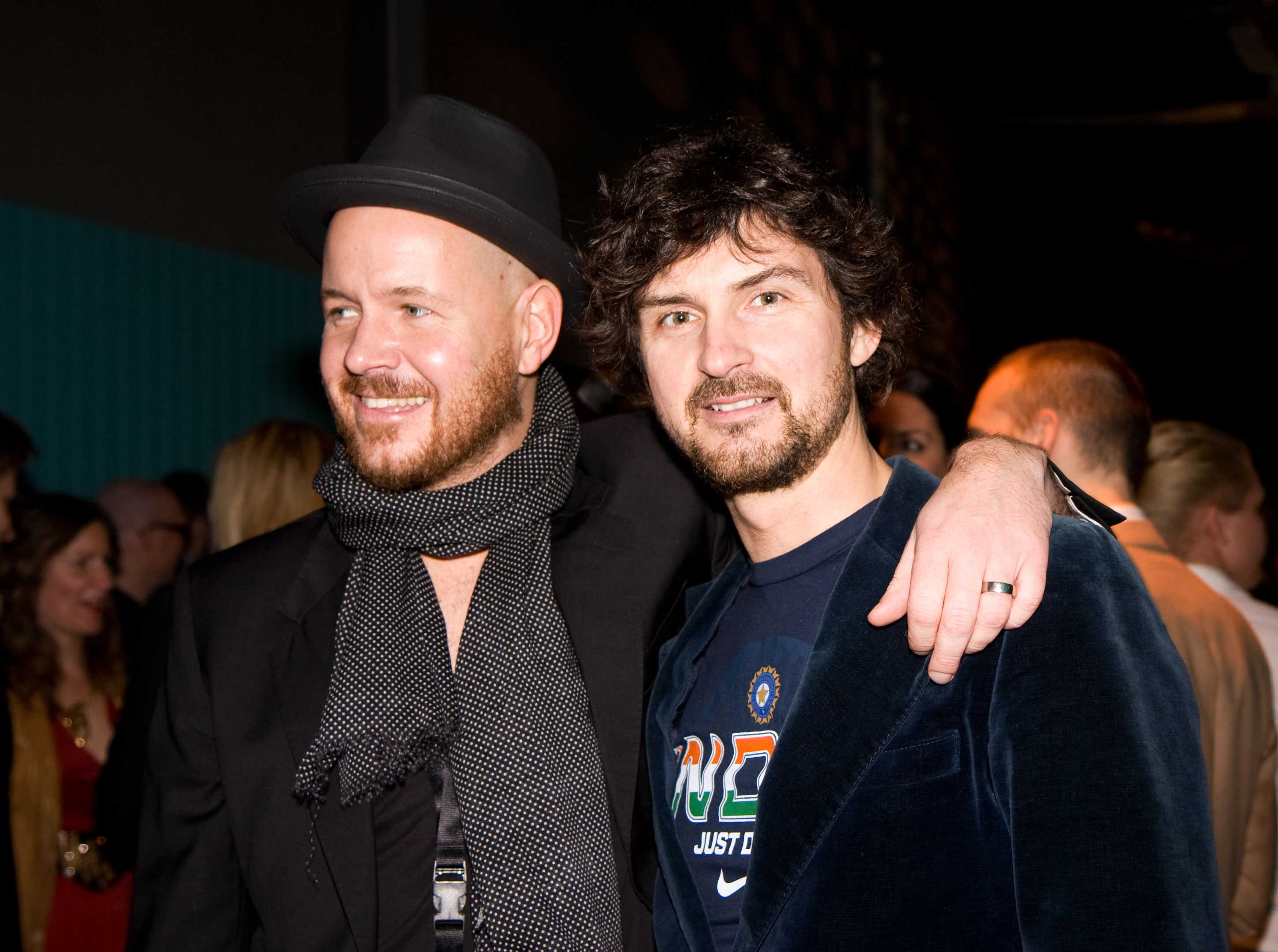 Photo: Emma Backman, Göteborg & Co